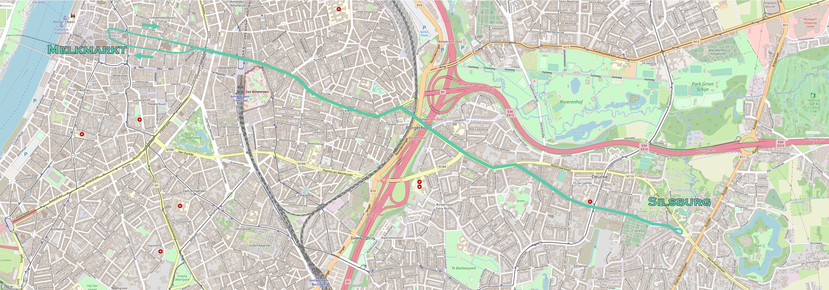 Tracé de la ligne 24 du tramway d'Anvers entre Silsburg et Melkmarkt, en usage entre le 22 décembre 2018 et novembre 2019 This map may be incomplete, and may contain errors. Don't rely solely on it for navigation.